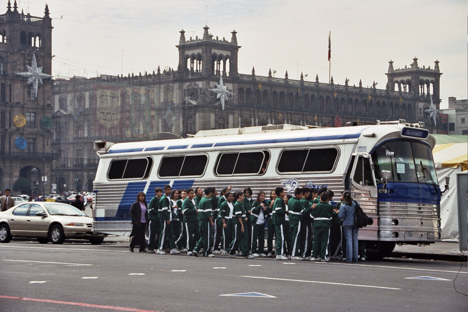 Ese tipo de autobús, o camión que le dicen allá, no se ve en Europa, salvo en las películas americanas.En el zócalo, niños de excursión.